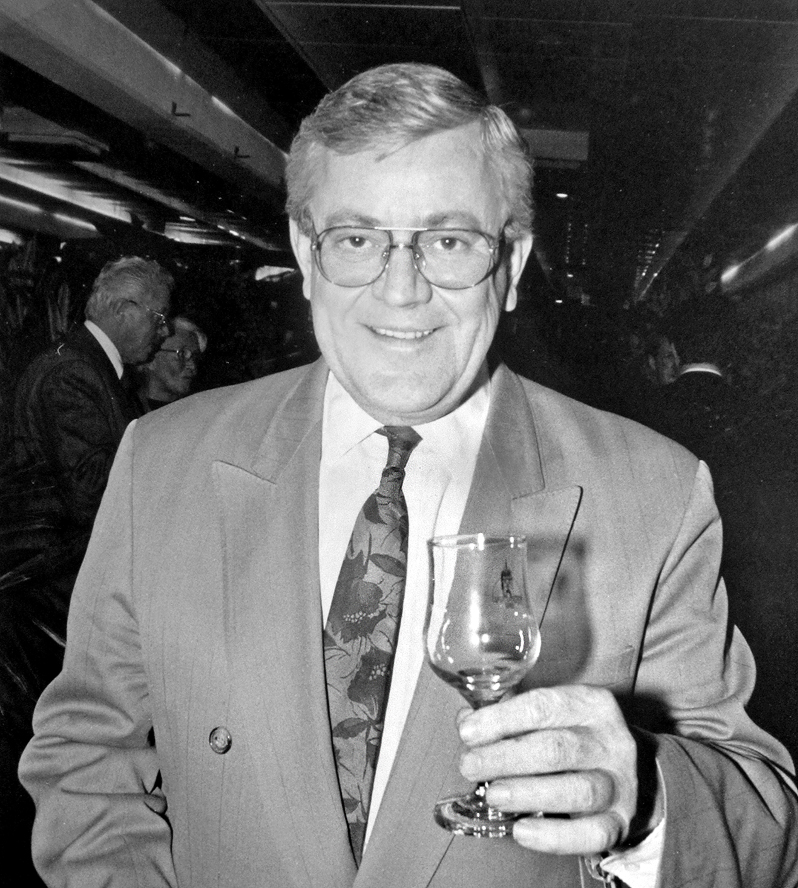 Lars Engqvist provade vin på Skyline Hotell i Malmö 1992.